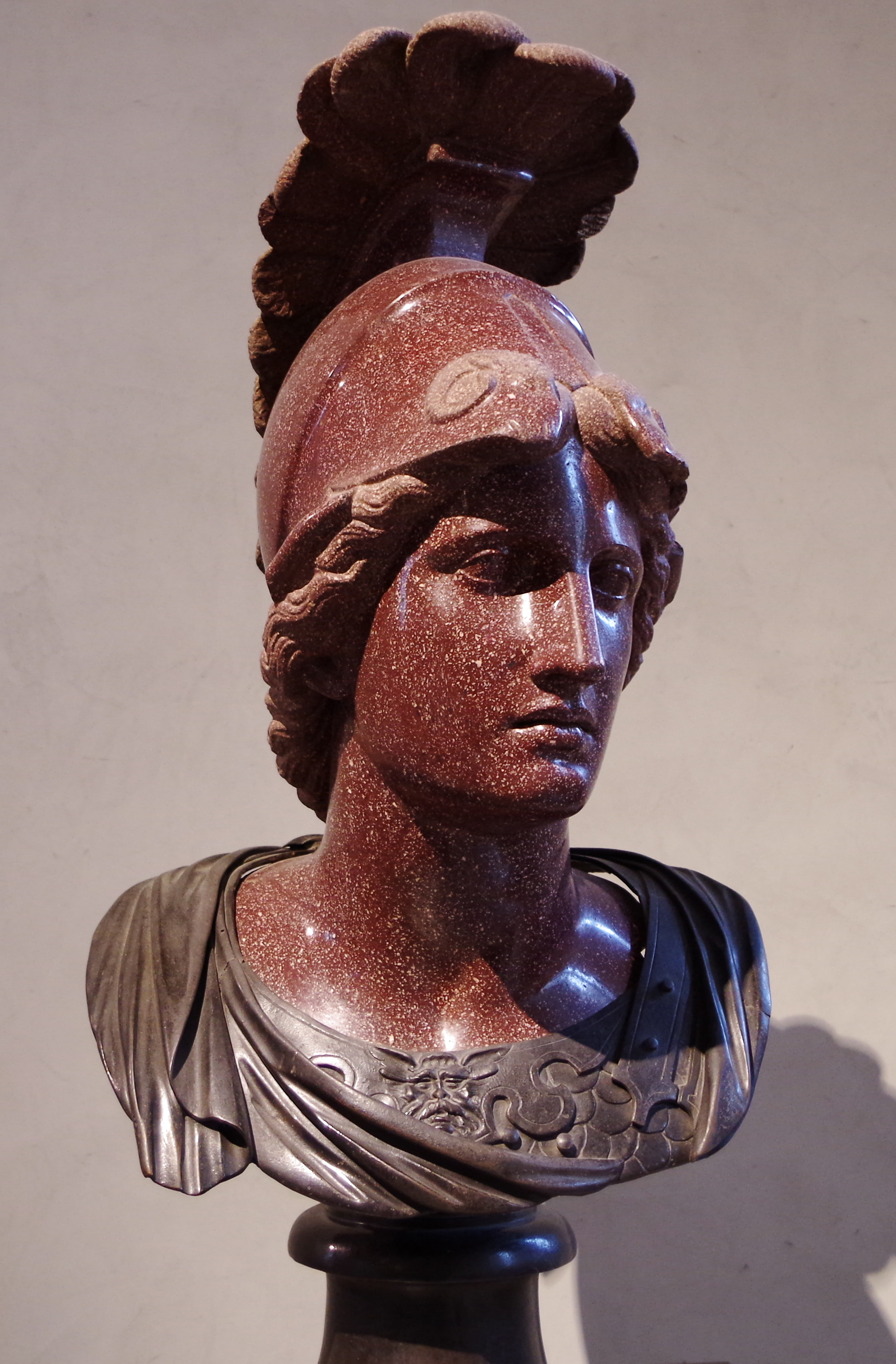 Minerve dit Alexandre Mazarin - MR 1633 Ma 3385 - Louvre